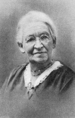 Julie Heierli Portrait